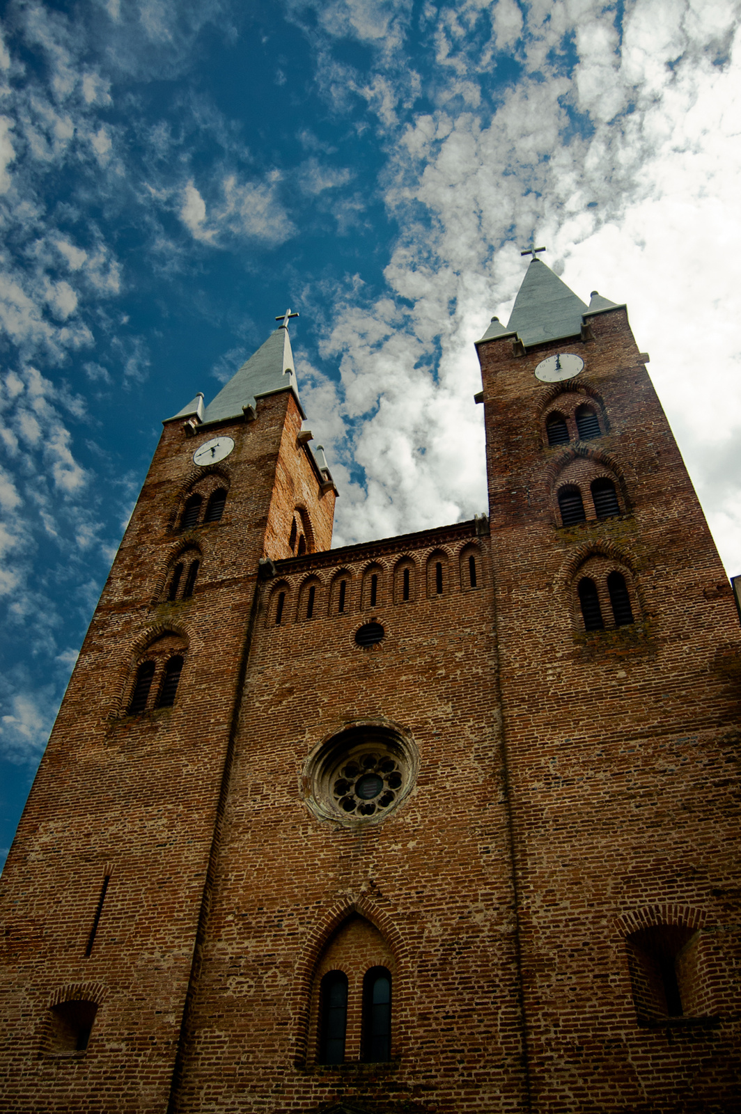 Prépostsági templom (Türje, Szabadság tér 20.)